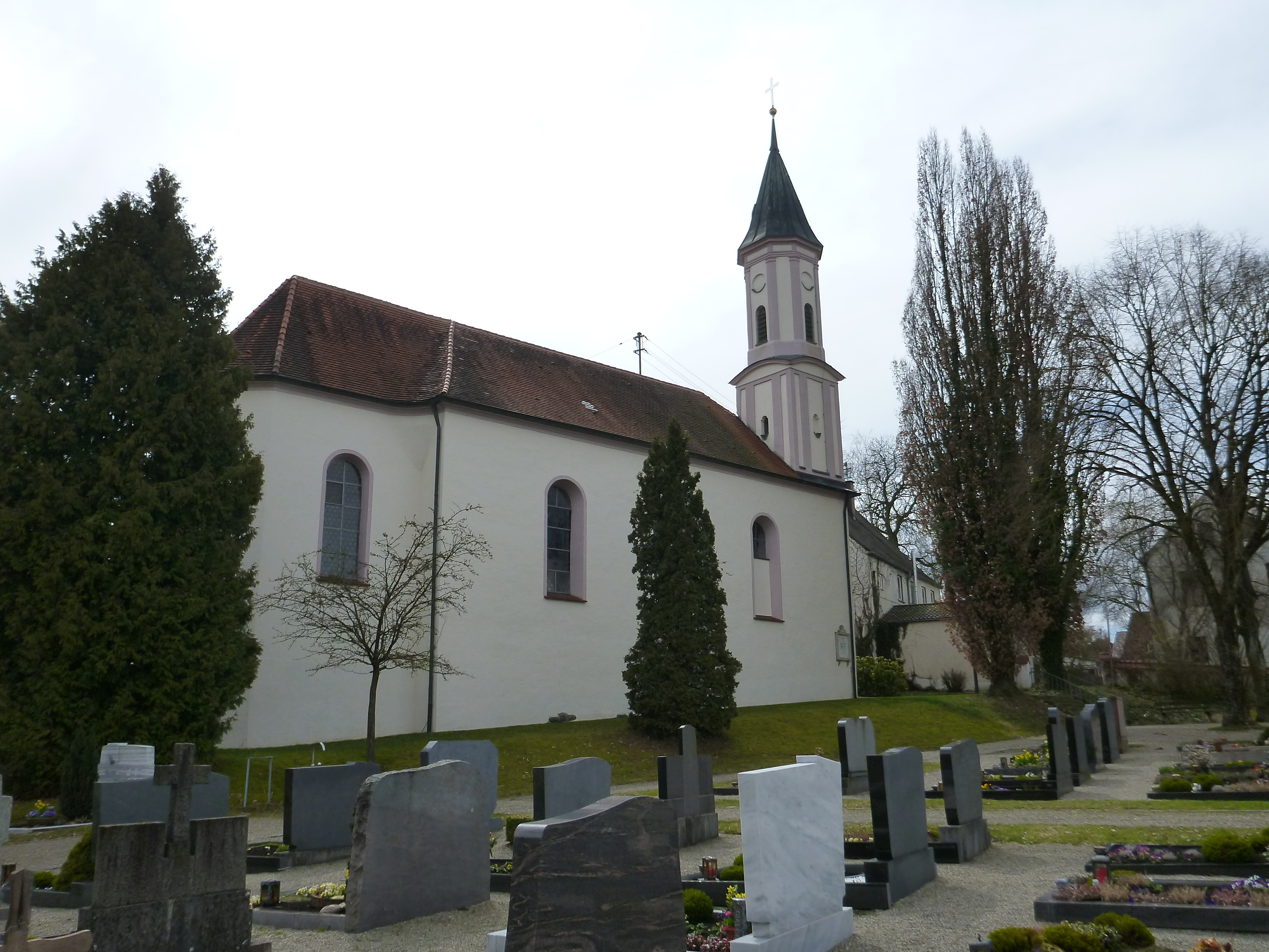 Katholische Pfarrkirche St. Vitus, Langhaus romanisch, Chor und Umgestaltung 1769 von Bernhard Nigg; mit Ausstattung. Heretsried